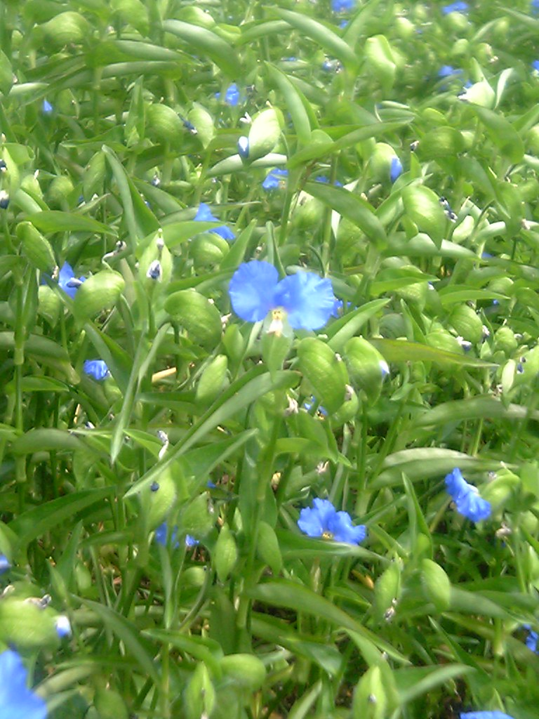 Commelina communis var. hortensis